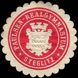 Sealing stamp Title: Paulsen - Realgymnasium - Steglitz Description: rot, weiß, geprägt Place: Steglitz size: 4 cm